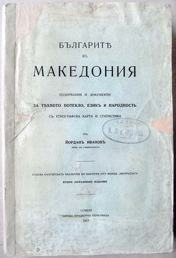 Българите в Македония